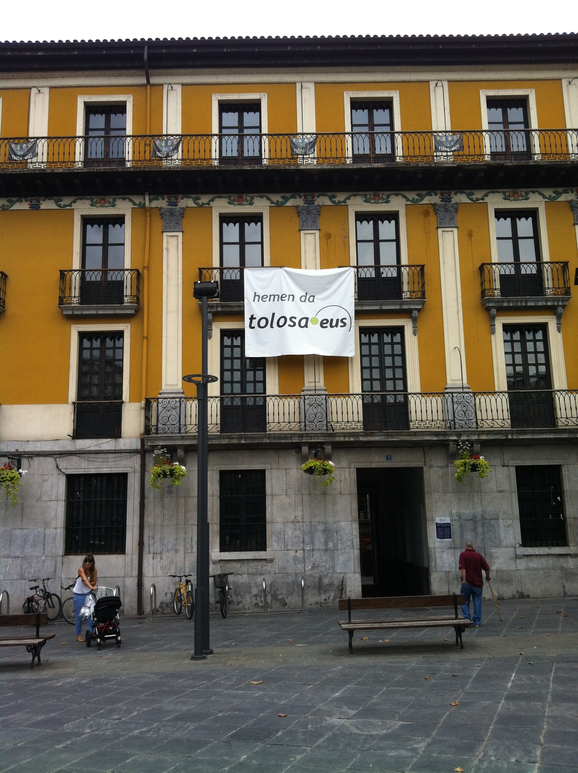 Domini .eus